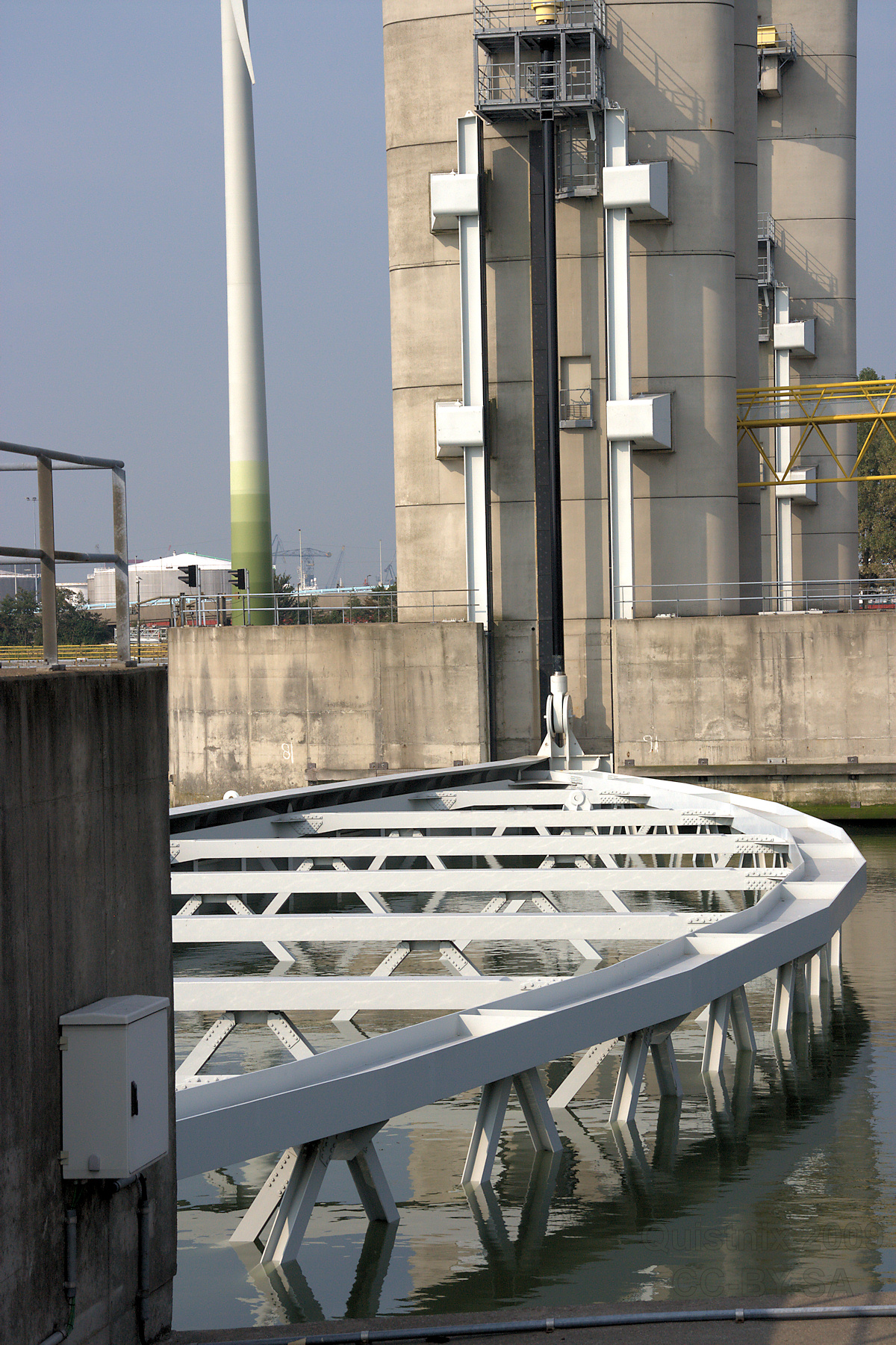 Spijkenisse: Hartelkering, neergelaten schuif